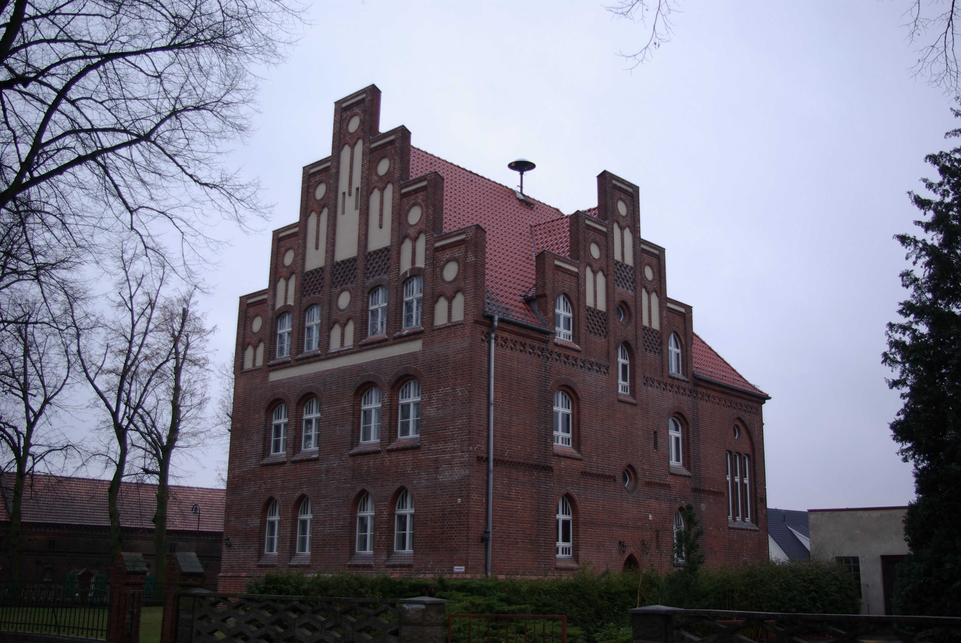 Mittenwalde (Mark) in Braqndenburg. Das Haus in der Dorfstraße 45 im Ortsteil Ragow steht gegenüber der Dorfkirche Ragow. Das haus steht unter Denkmalschutz.